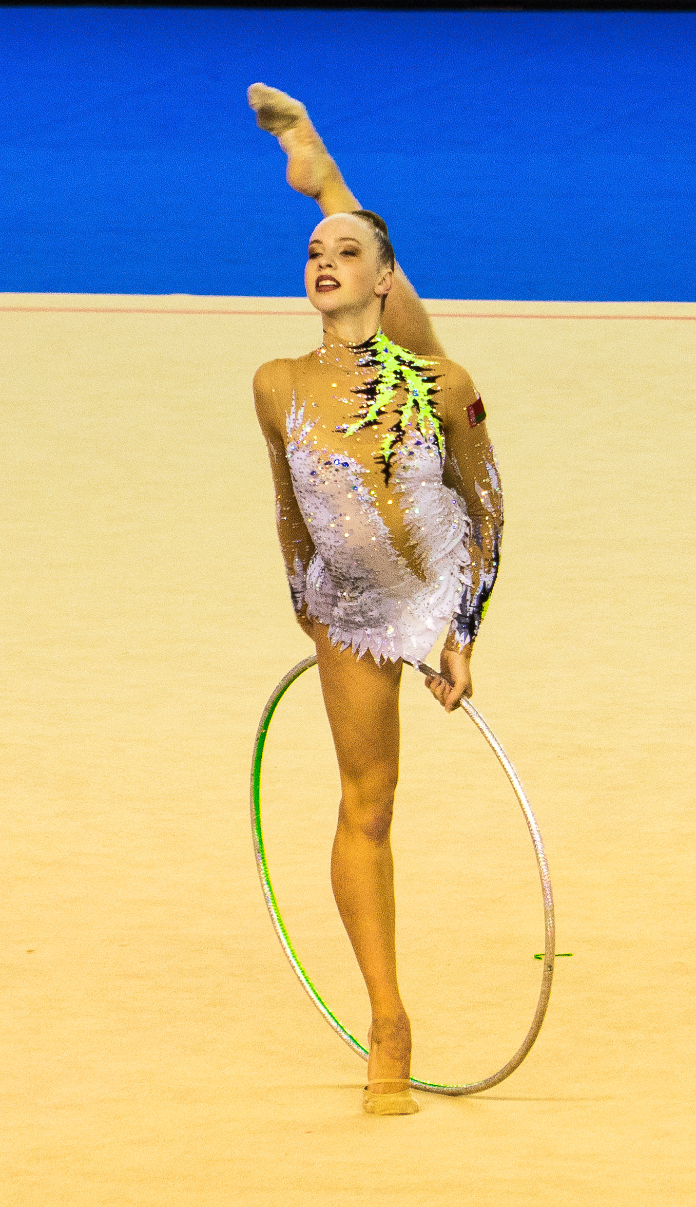 2017 Taipei Summer Universiade